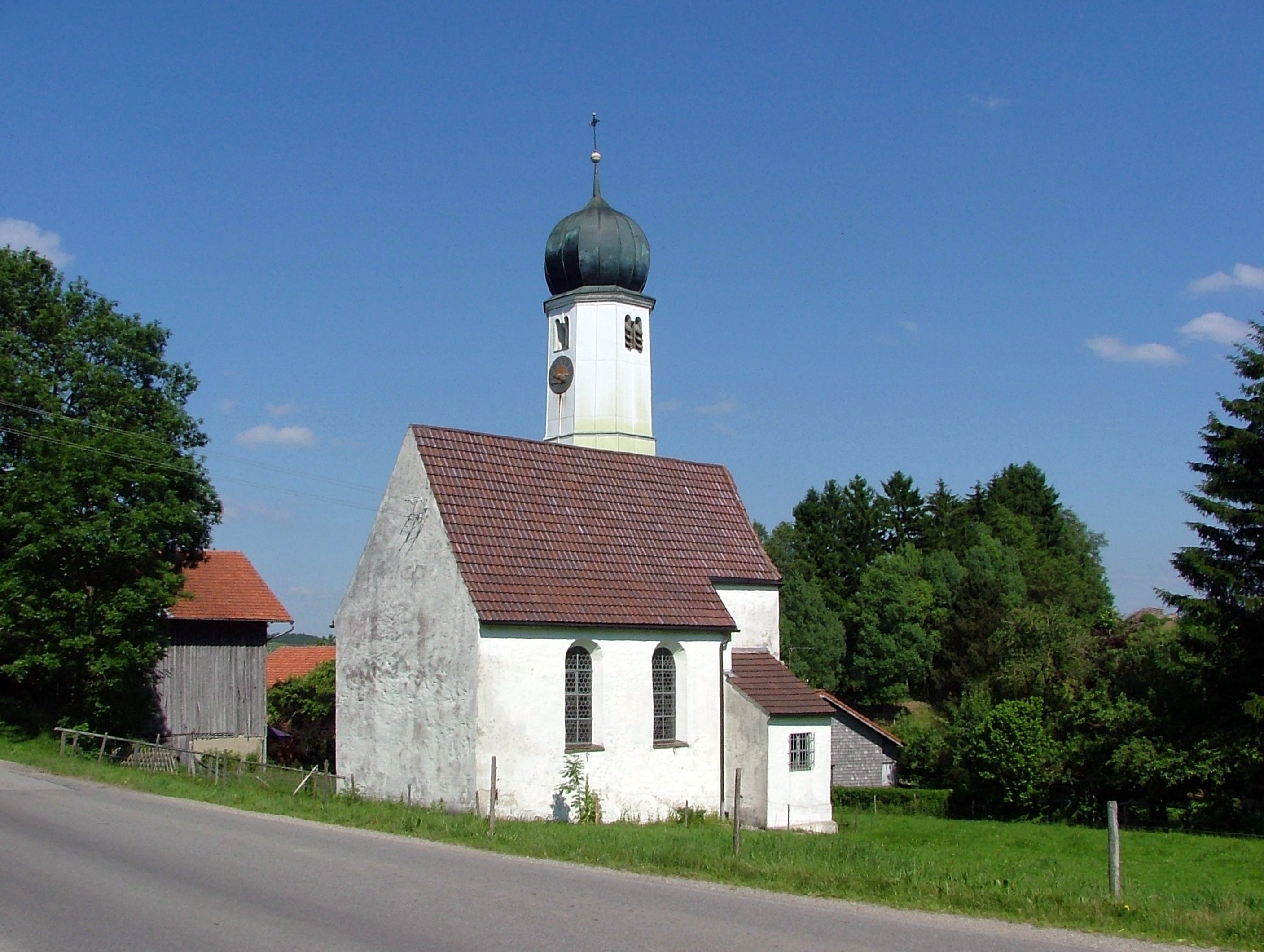 Kapelle Ronried